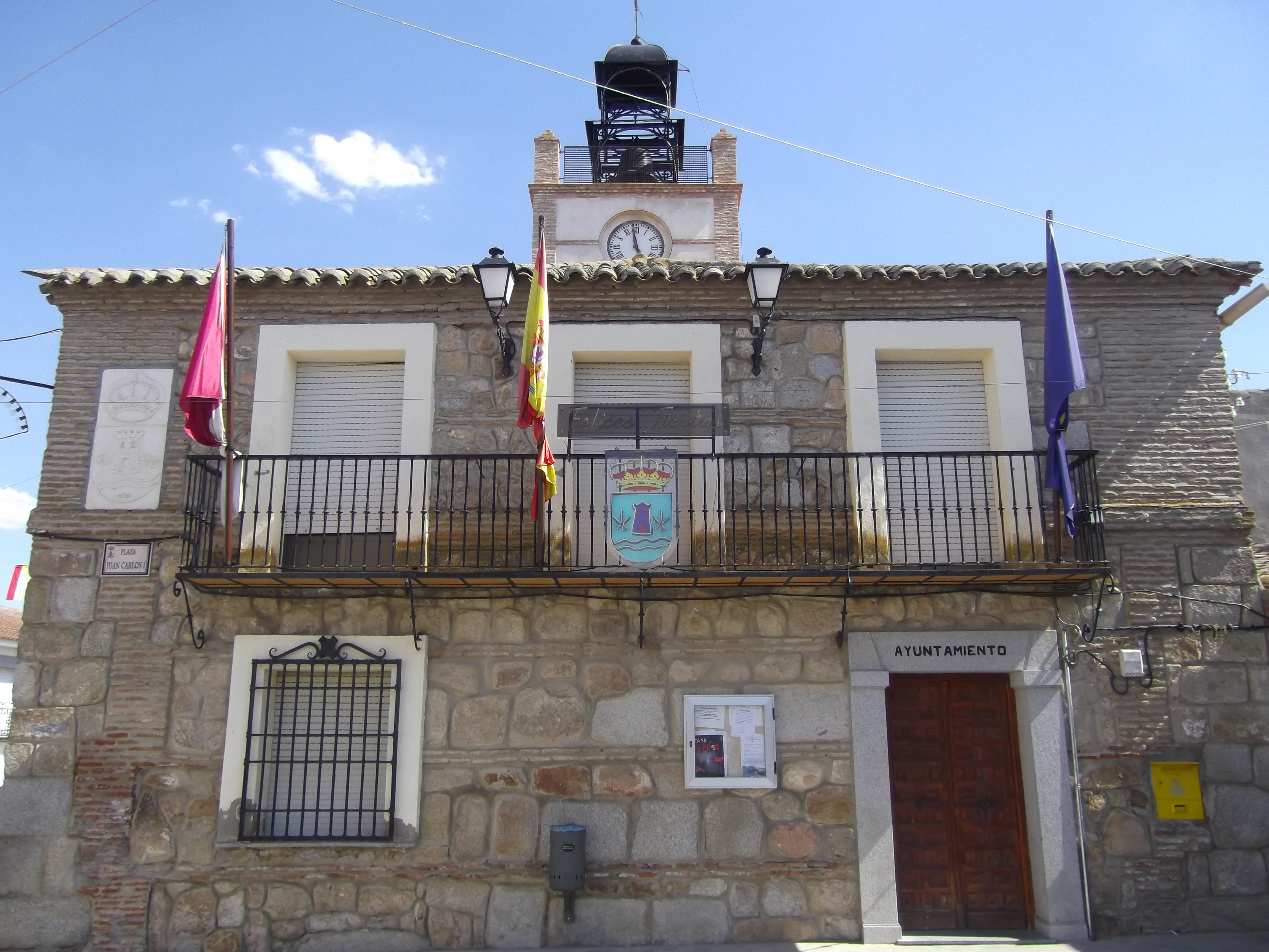 Fachada del Consistorio - Ayuntamiento de Mazarambroz (Toledo)